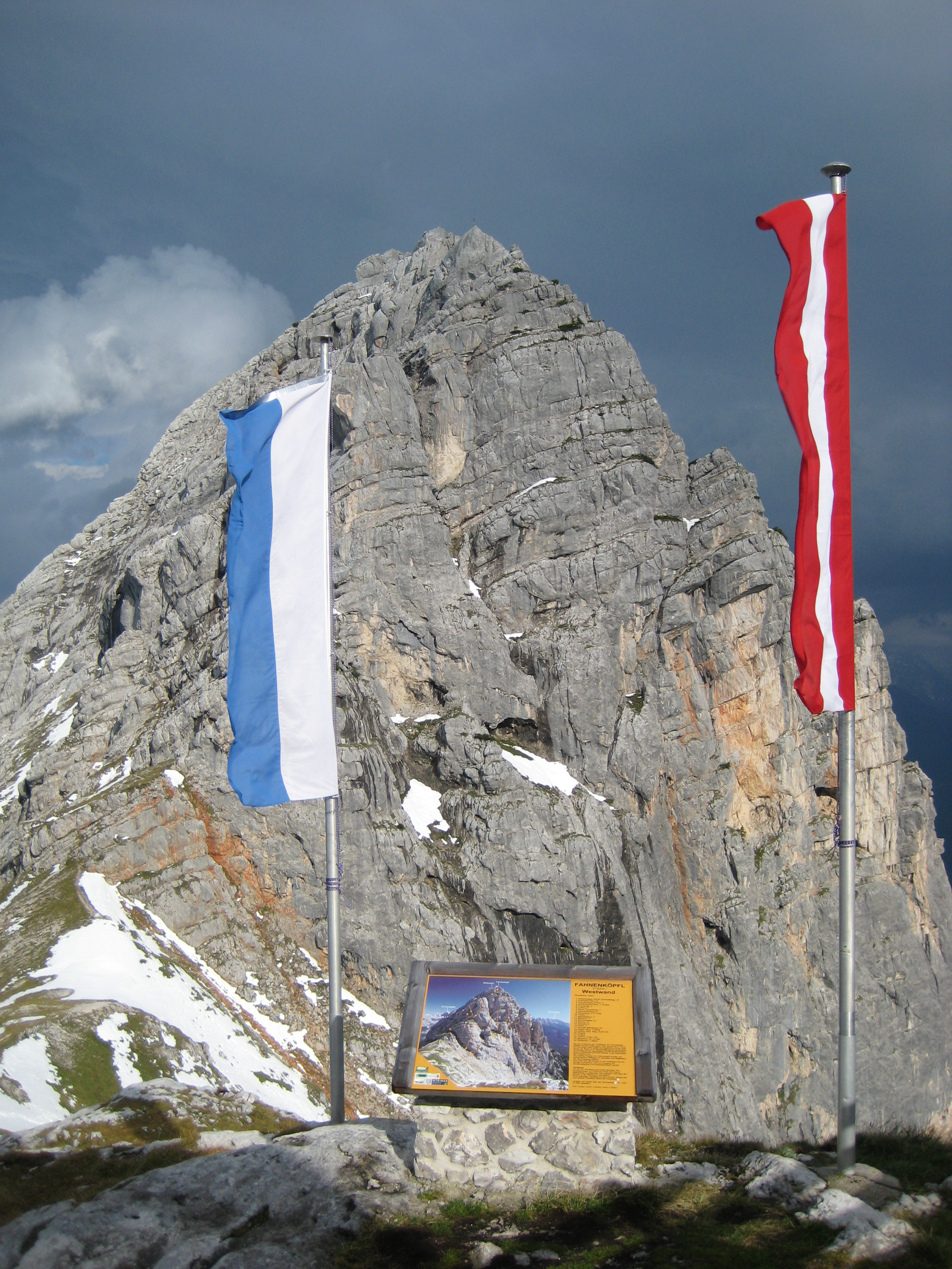 Blick von der Passauer Hütte auf die Westwand des Fahnenköpfl (2142 m)